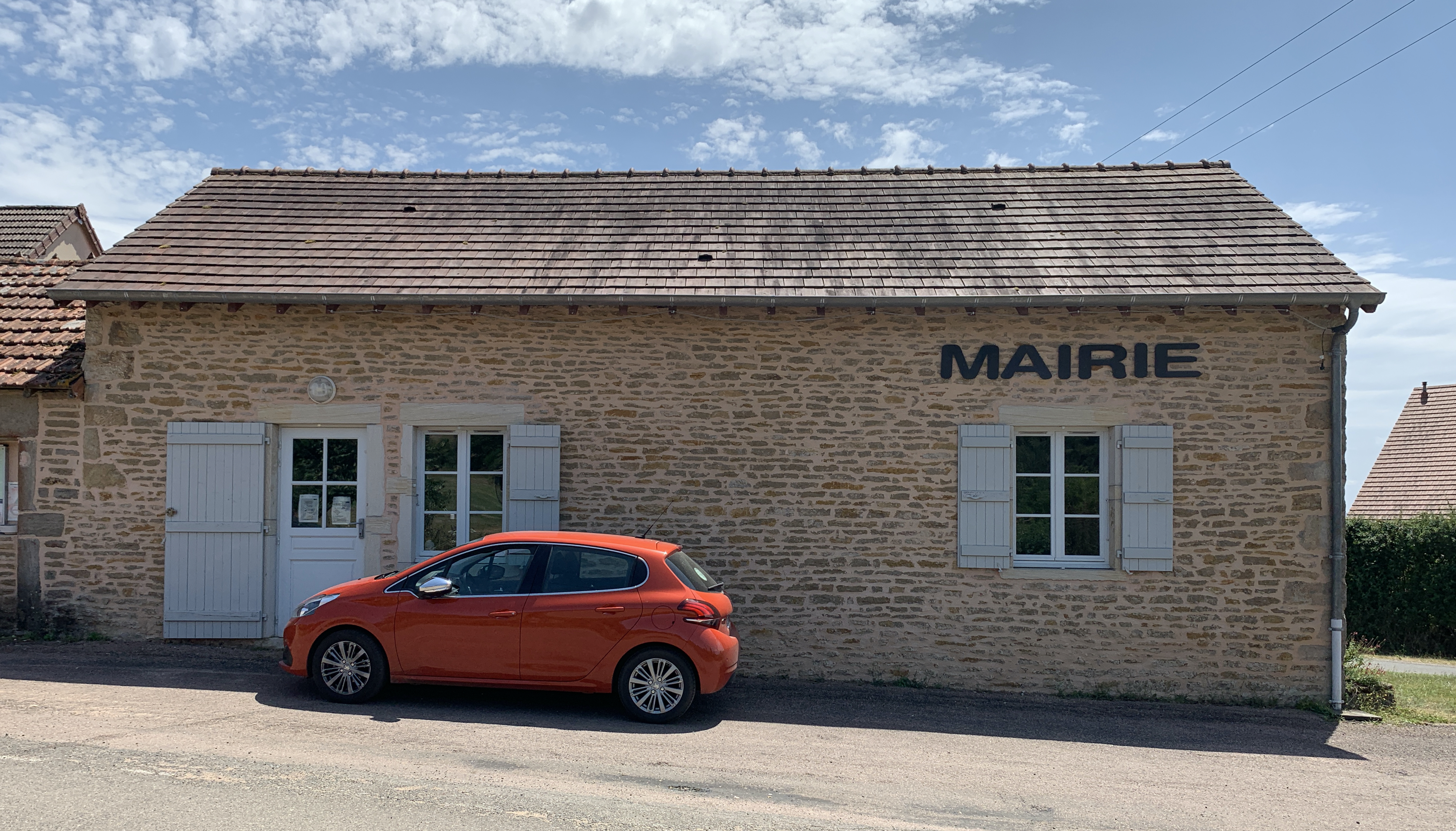 Mairie de Saint-André-le-Désert.